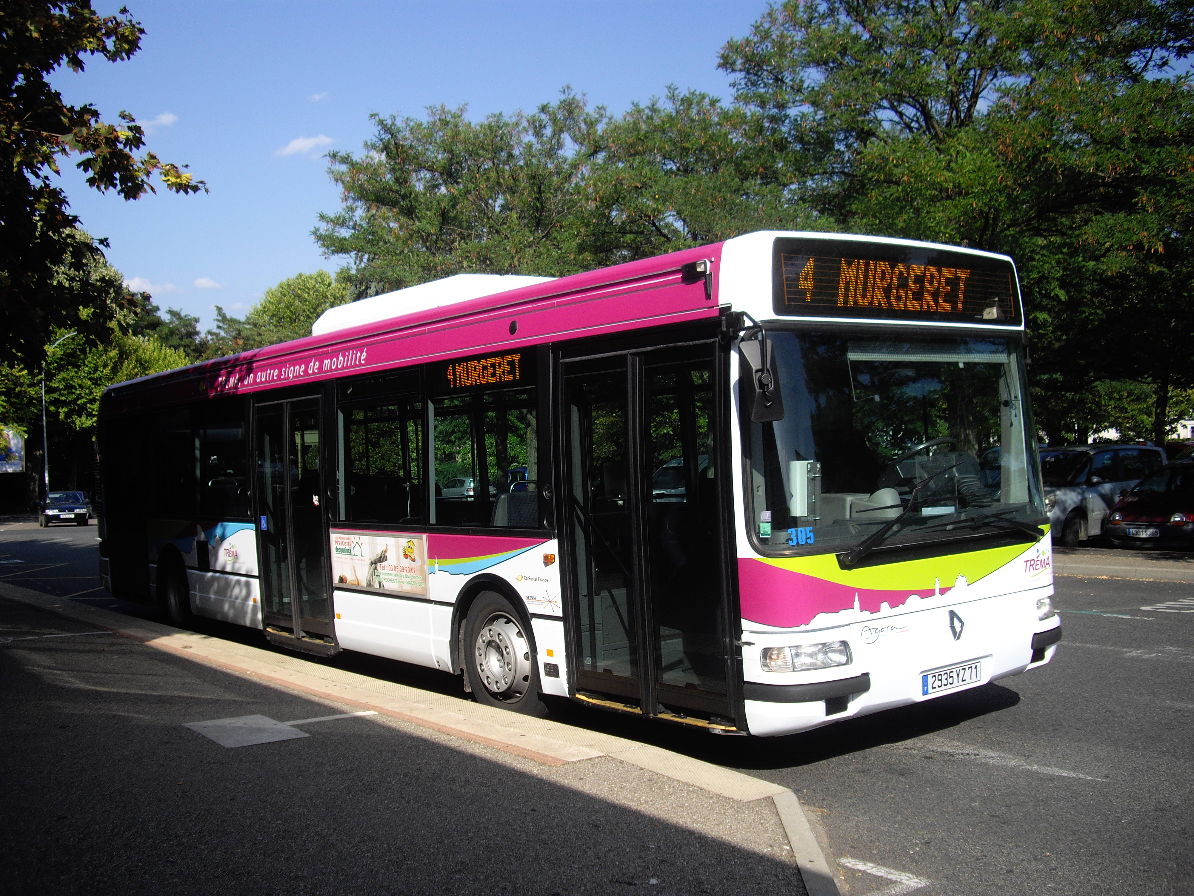 Irisbus Agora S n°305 à la Gare de Mâcon, sur la ligne 4 du réseau Tréma